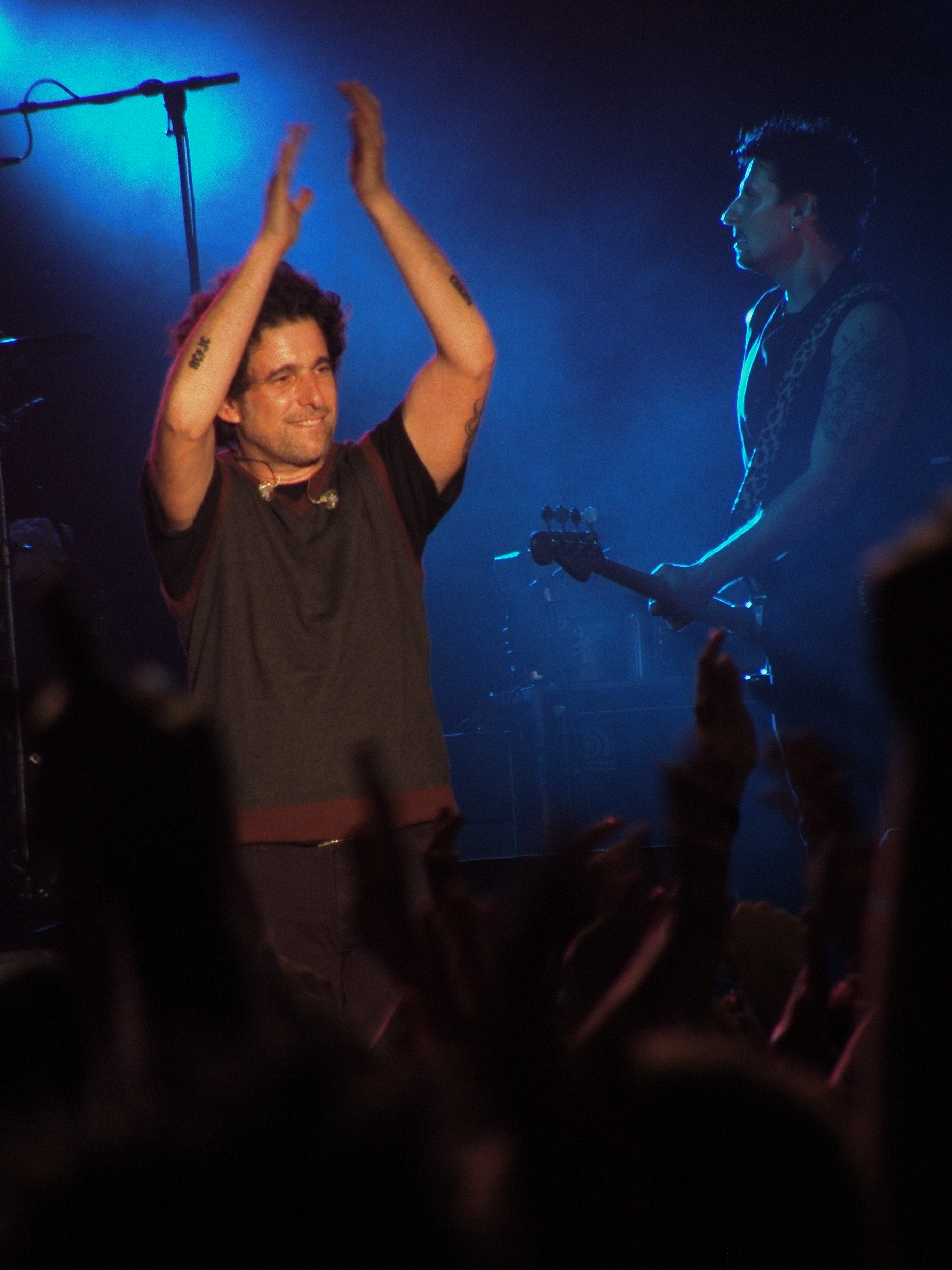 El cantante Andrés Calamaro en un concierto en el complejo municipal San Lázaro, como broche a las fiestas de San Mateo de Oviedo.